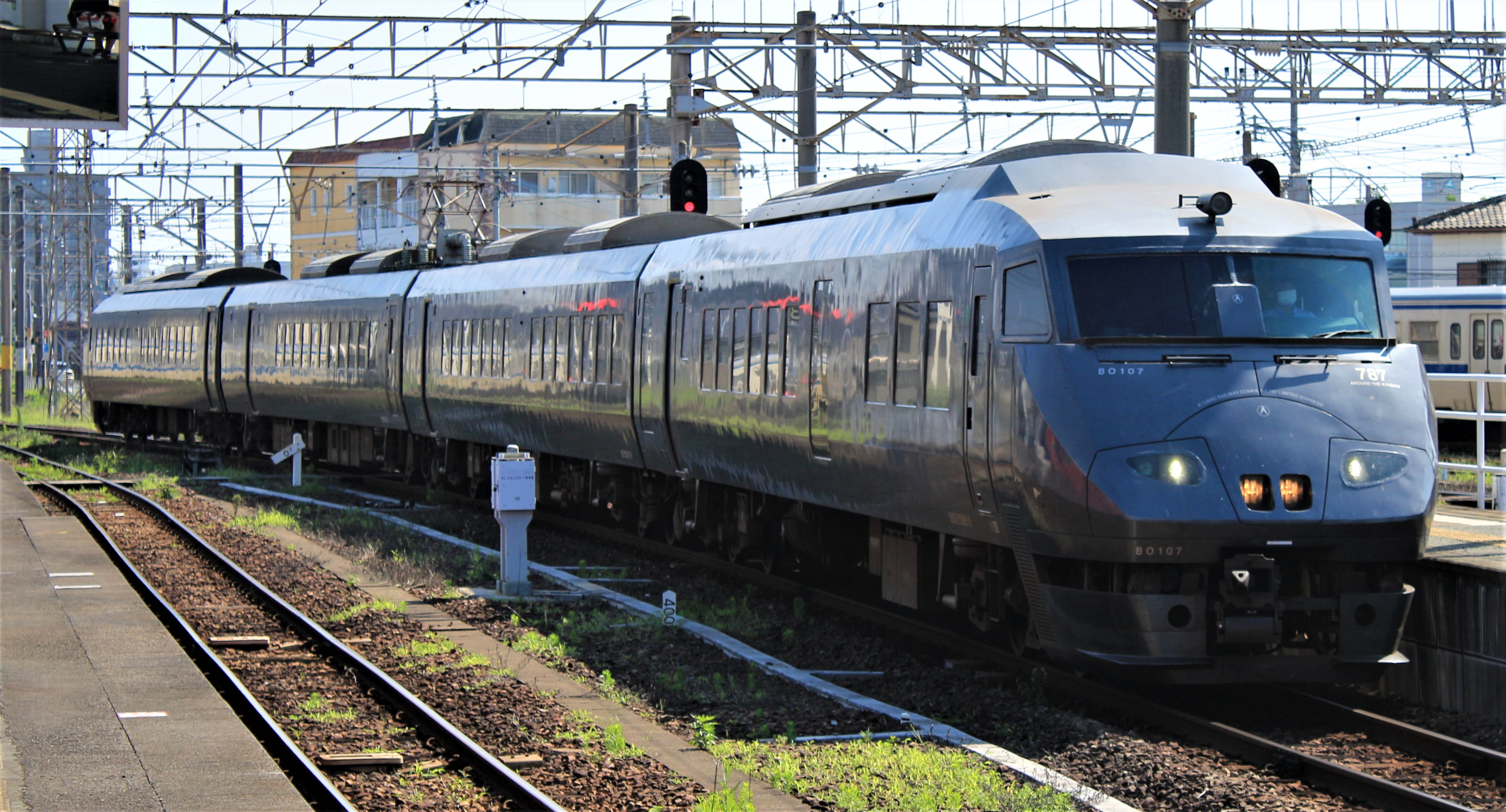 JR九州787系電車